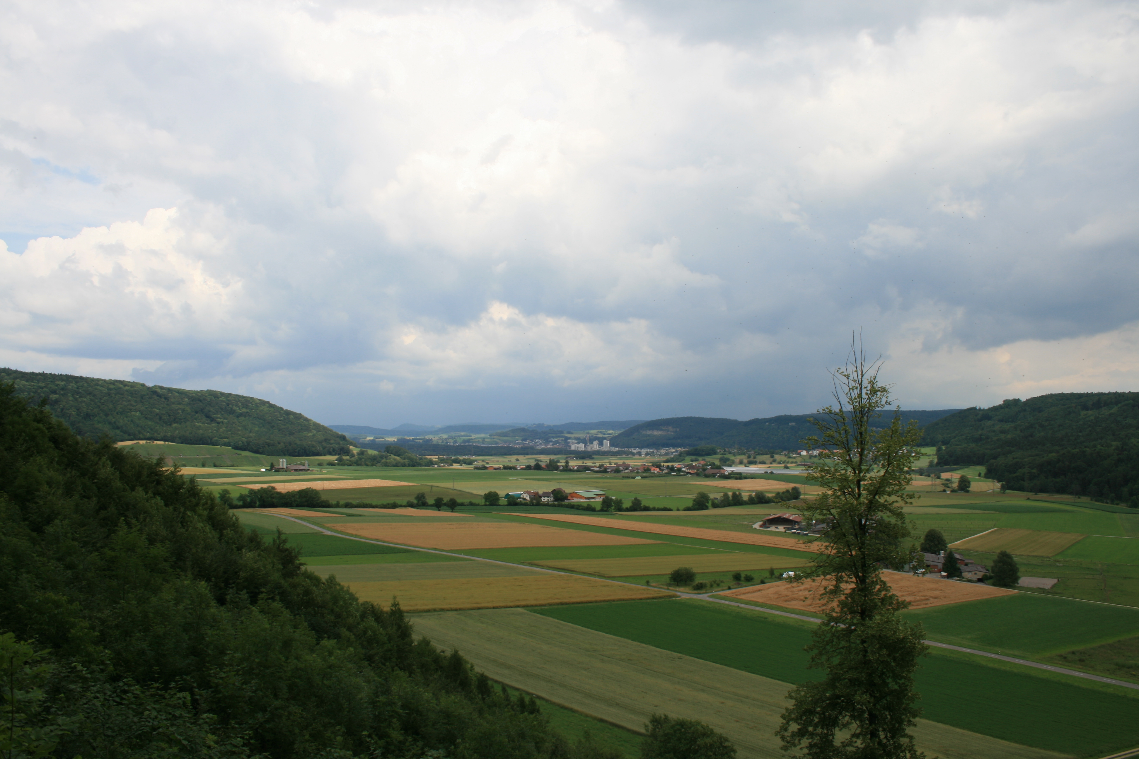 Blick vom Iberg (Gemeinde Riniken) Richtung Siggenthal-Station im unteren Aaretal